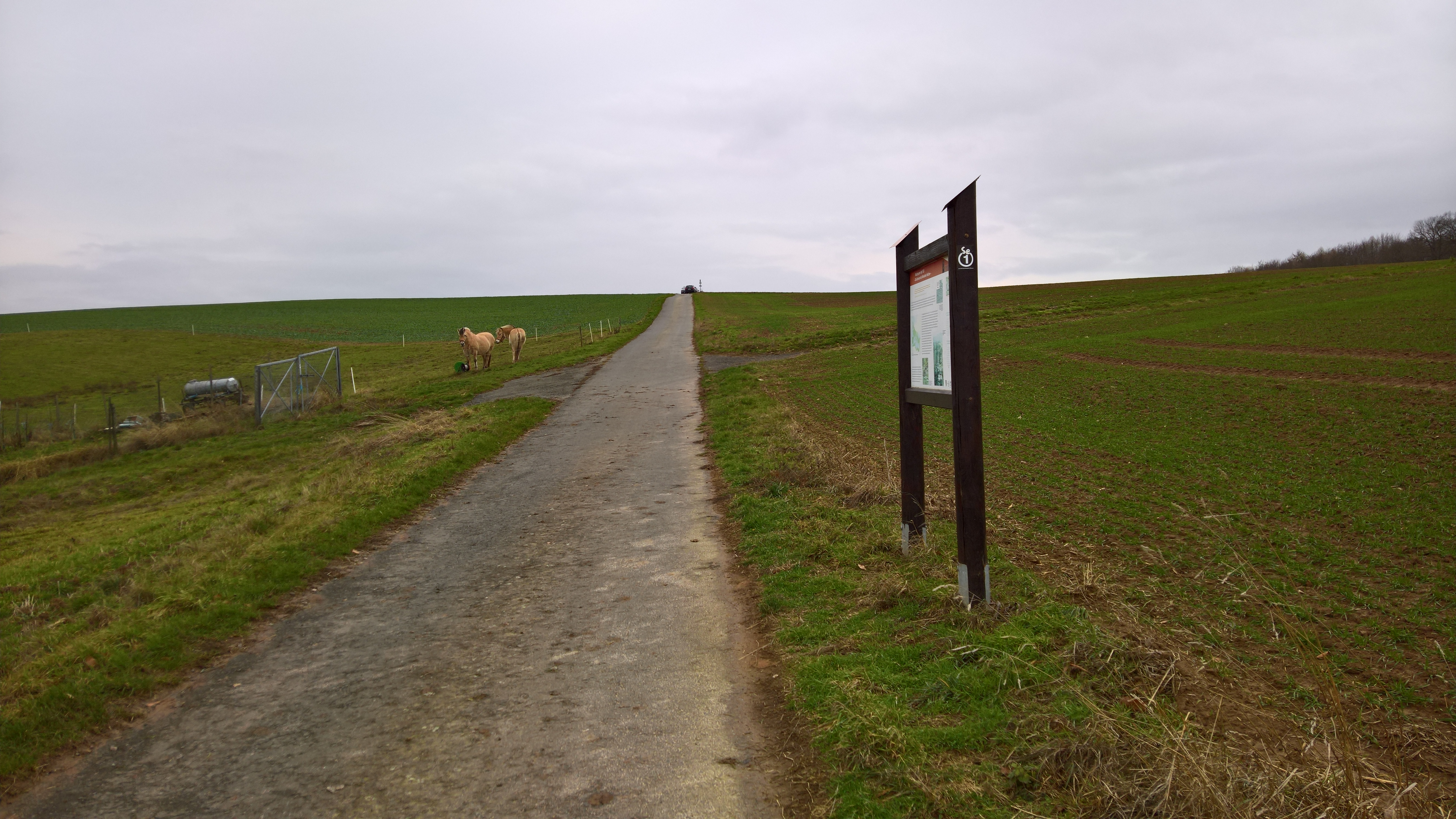 Limes-Informationstafel zu Wp10/6 zw. Lützelbach und Seckmauern am Limespfad und der Alten Landstraße Blick nach Westen. Waldrand (rechts iam Bildrand) ist Landesgrenze zwischen Hessen (Feld) und Bayern (Wald)